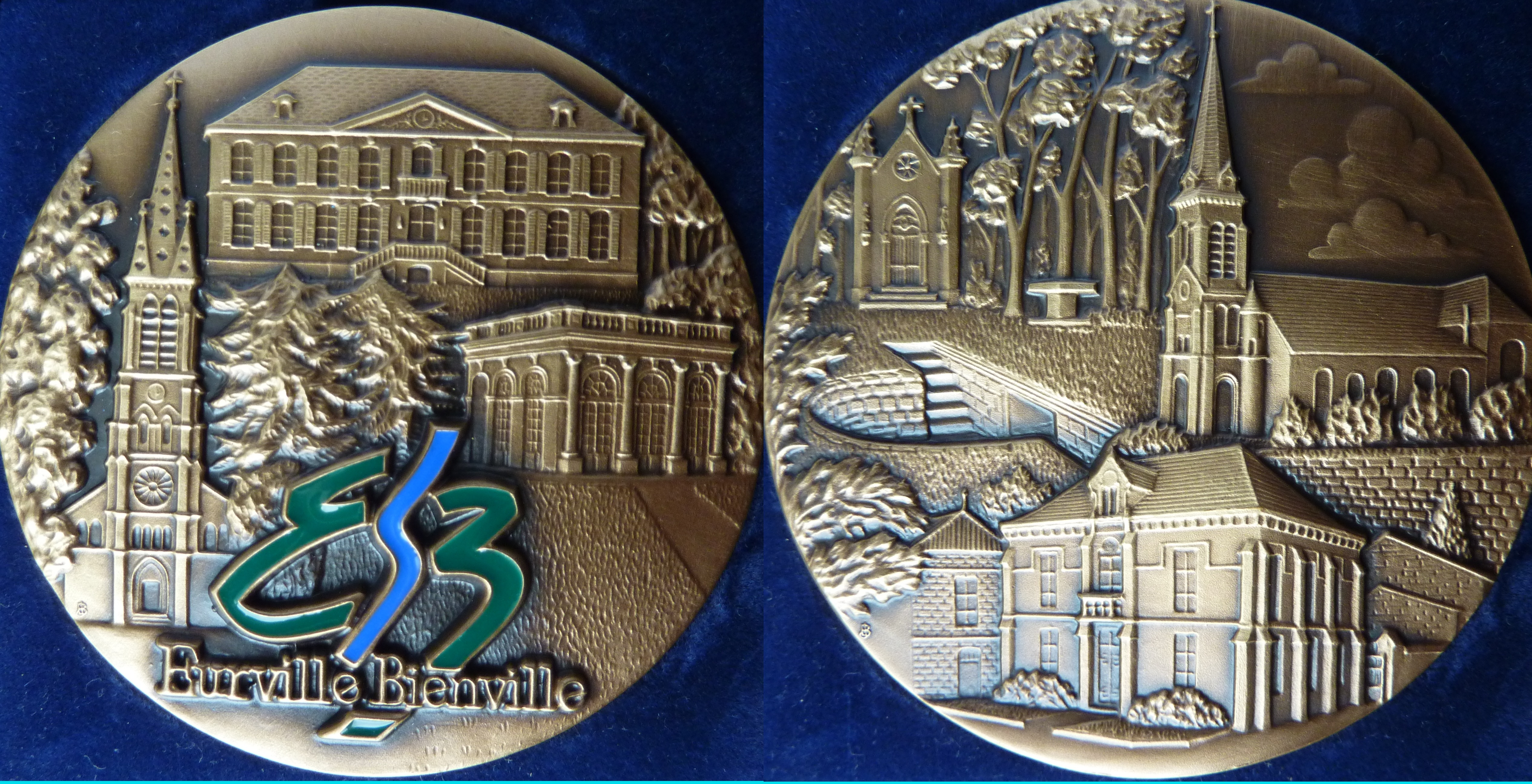 Médaille commémorative présentant les momunents d'Eurville Bienville A l'avers : - le logo de la commune les lettres E et B stylisées séparé par une ligne courbe bleue représentant la Marne - Monuments d'Eurville : église, château, orangerie Au revers les monuments de Bienville : château, église et chapelle Sainte-Menehould